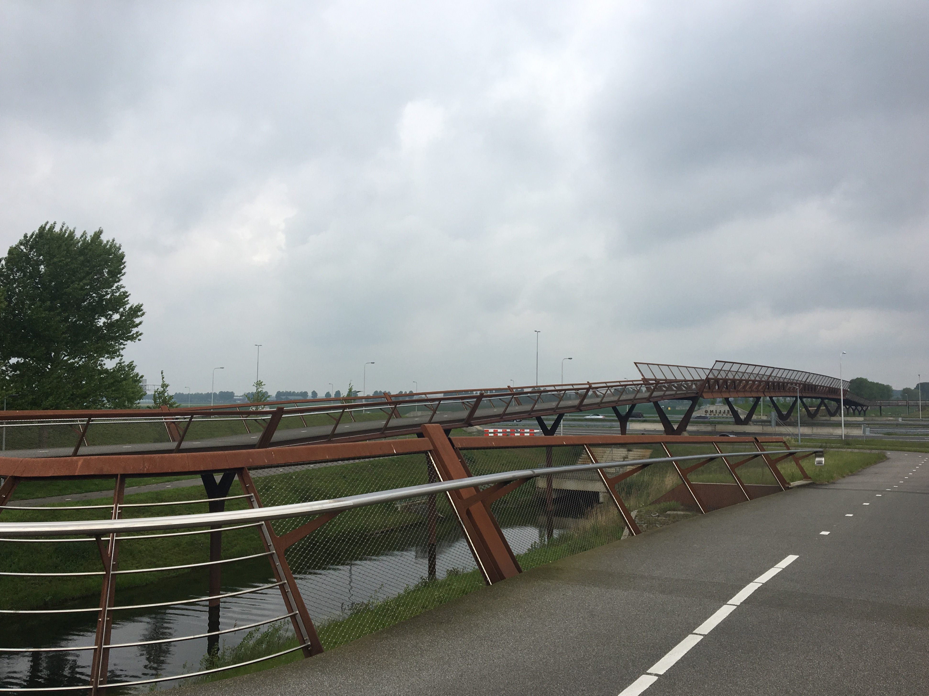 Fietsbrug geniedijk over de A4 bij Hoofddorp.